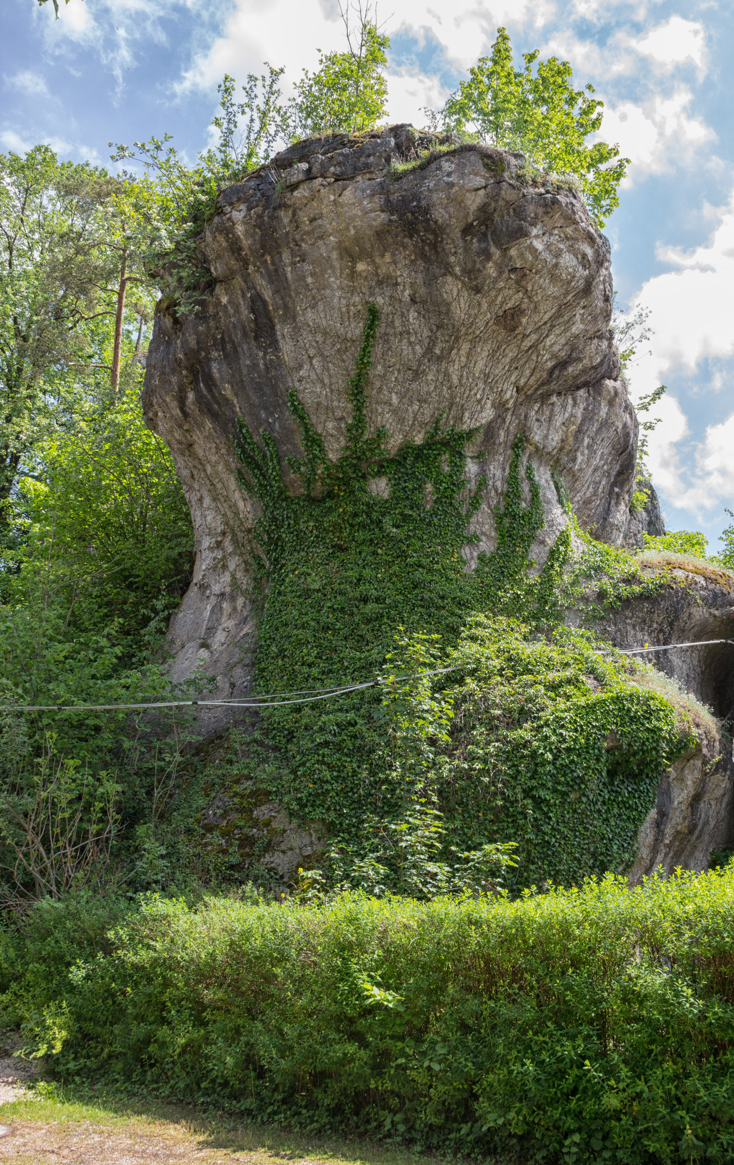 Dolomitfels, Naturdenkmla, Geotop, Naturpark Fränkische Schweiz-Veldensteiner Forst